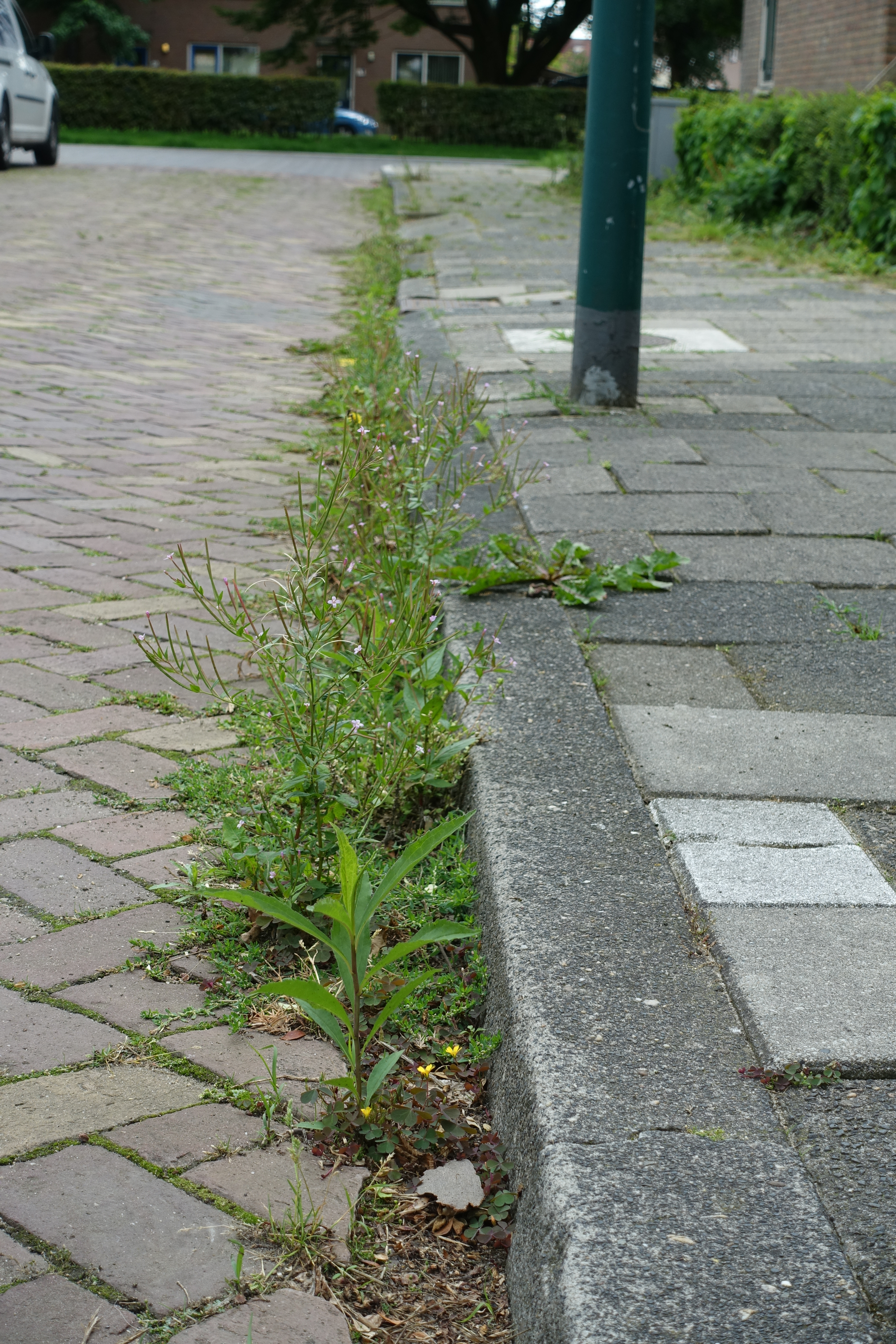 Straatonkruid in Woerden Schilderskwartier juli 2017